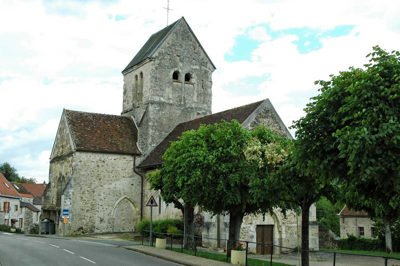 Église de Saint-Agnan.